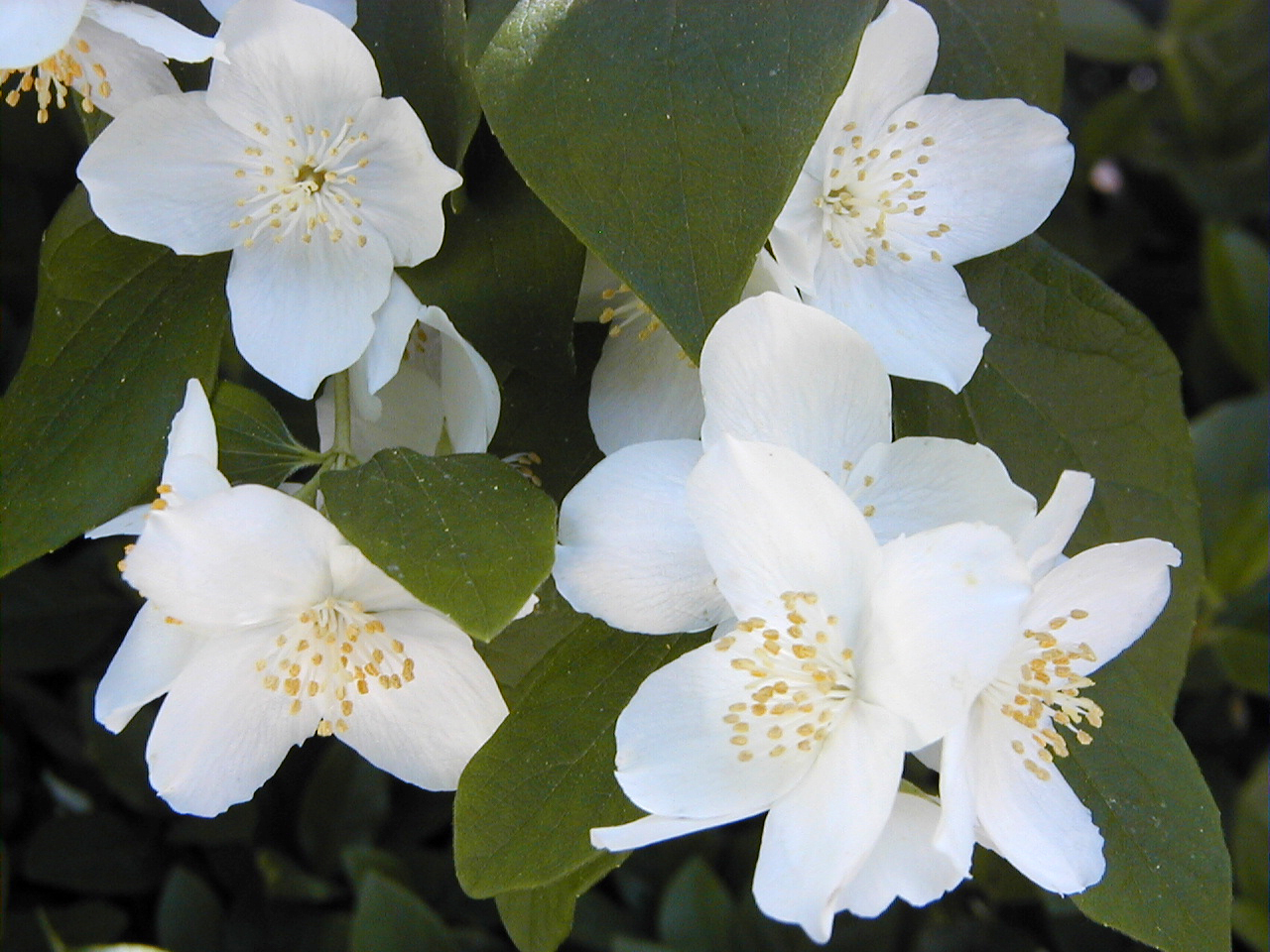 Philadelphus pubescens. Real Jardín Botánico, Madrid.